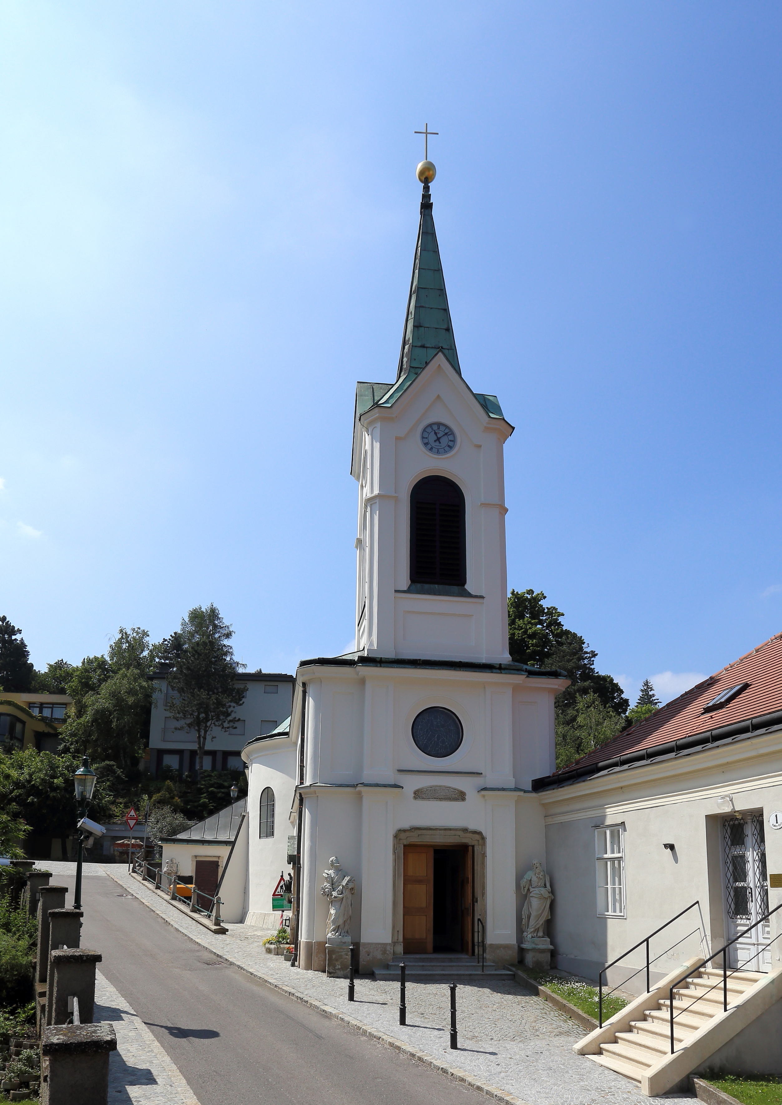 Katholische Pfarrkirche hl. Rochus in Neustift am Walde, ein Ortsteil des Wiener Gemeindebezirkes Döbling.